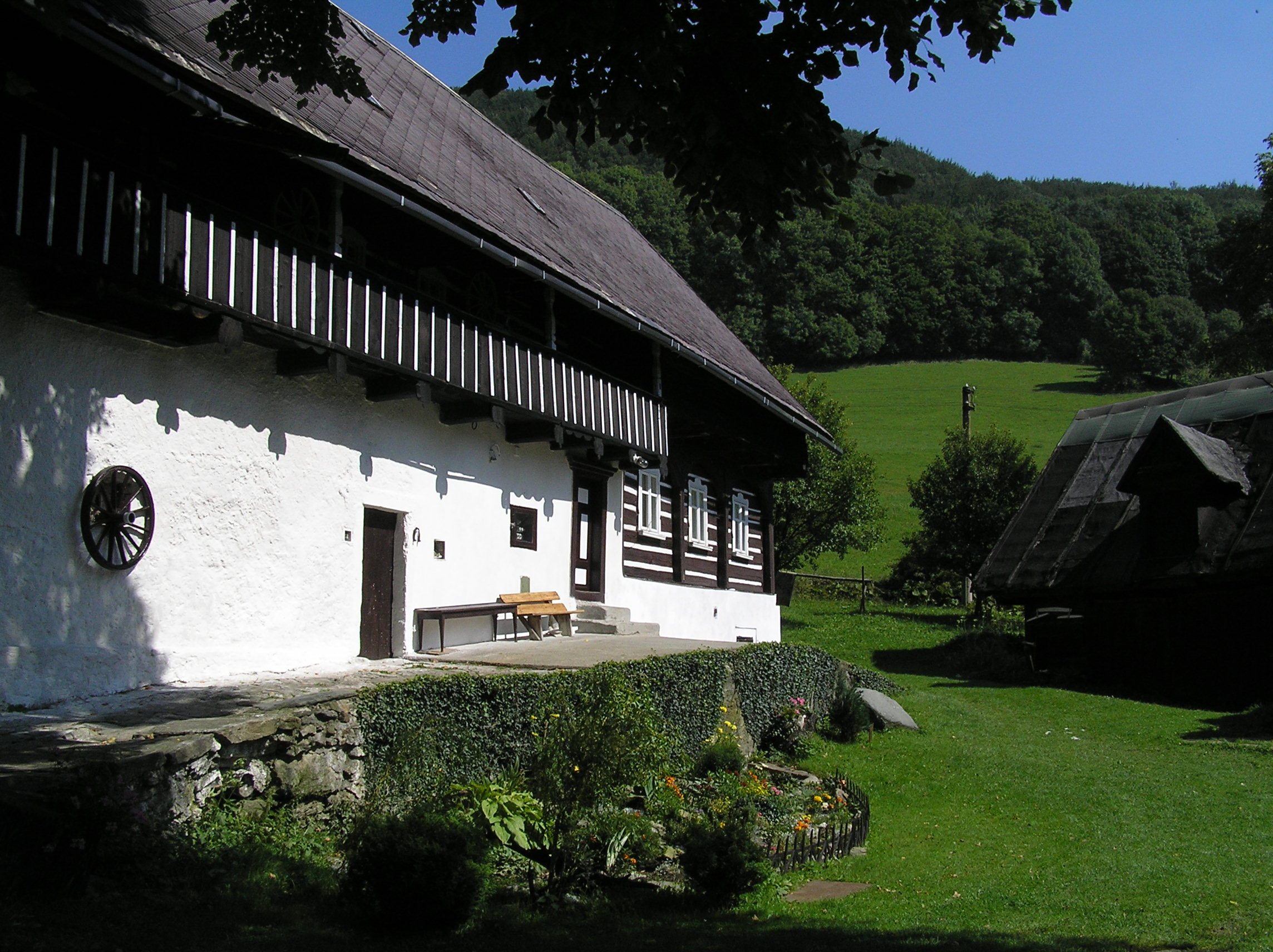 Padouchov - statek U Havelků čp. 2